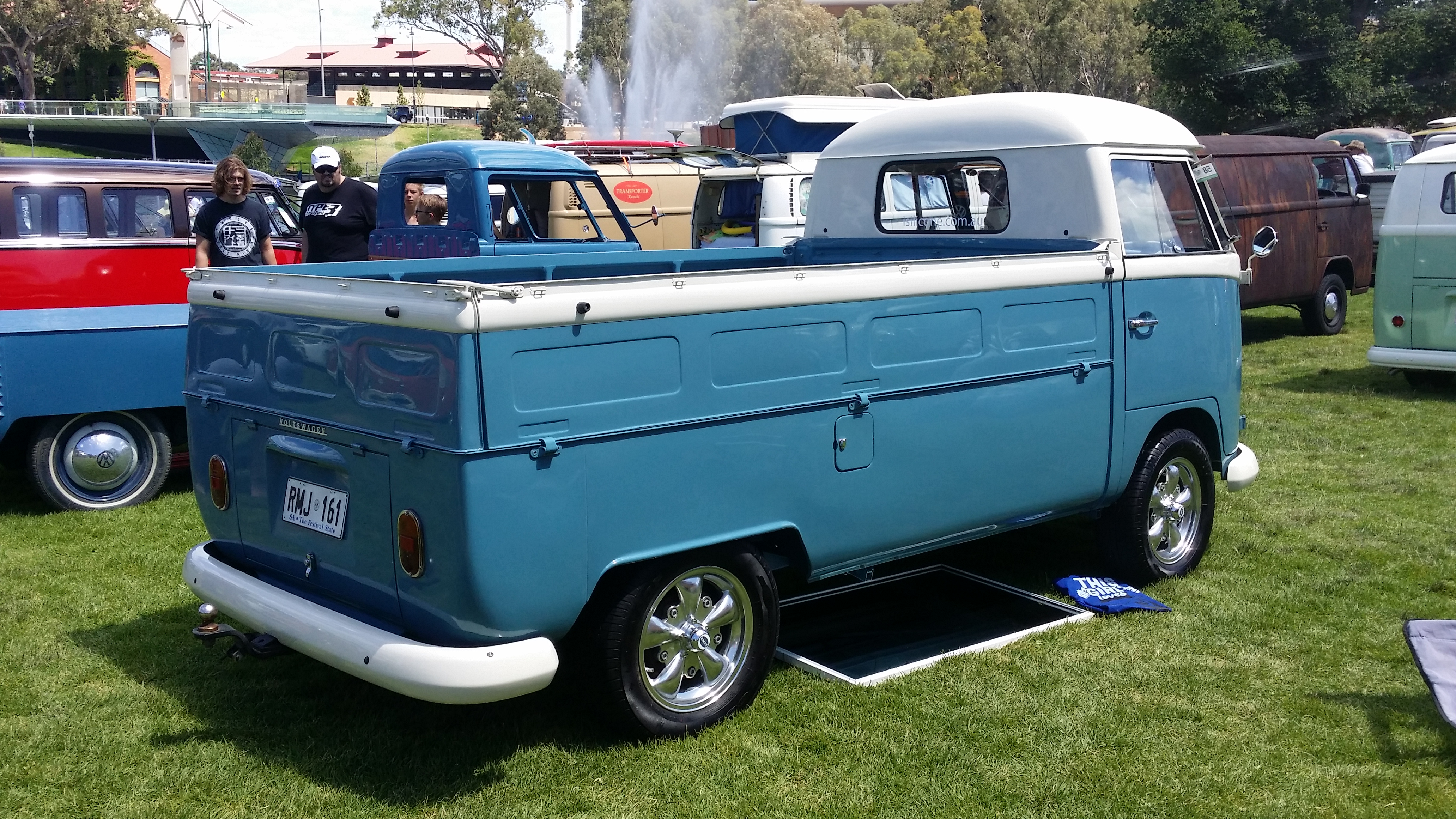 Volkswagen Kombi Ute